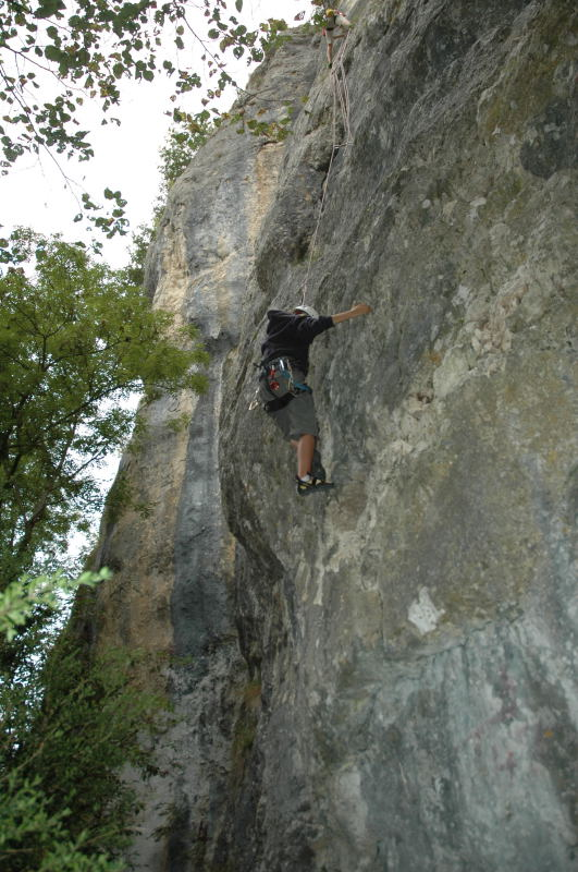 Secteur Dièdre St Loup